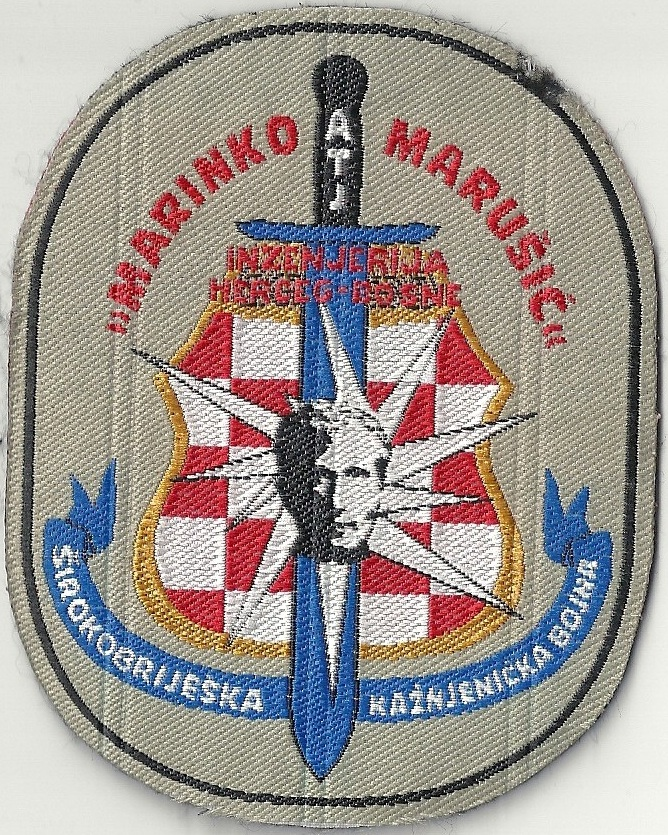 Badge of the Croatian HVO - ATJ Širokobriješka Kažnjenička bojna HVO – Marinko Marušić